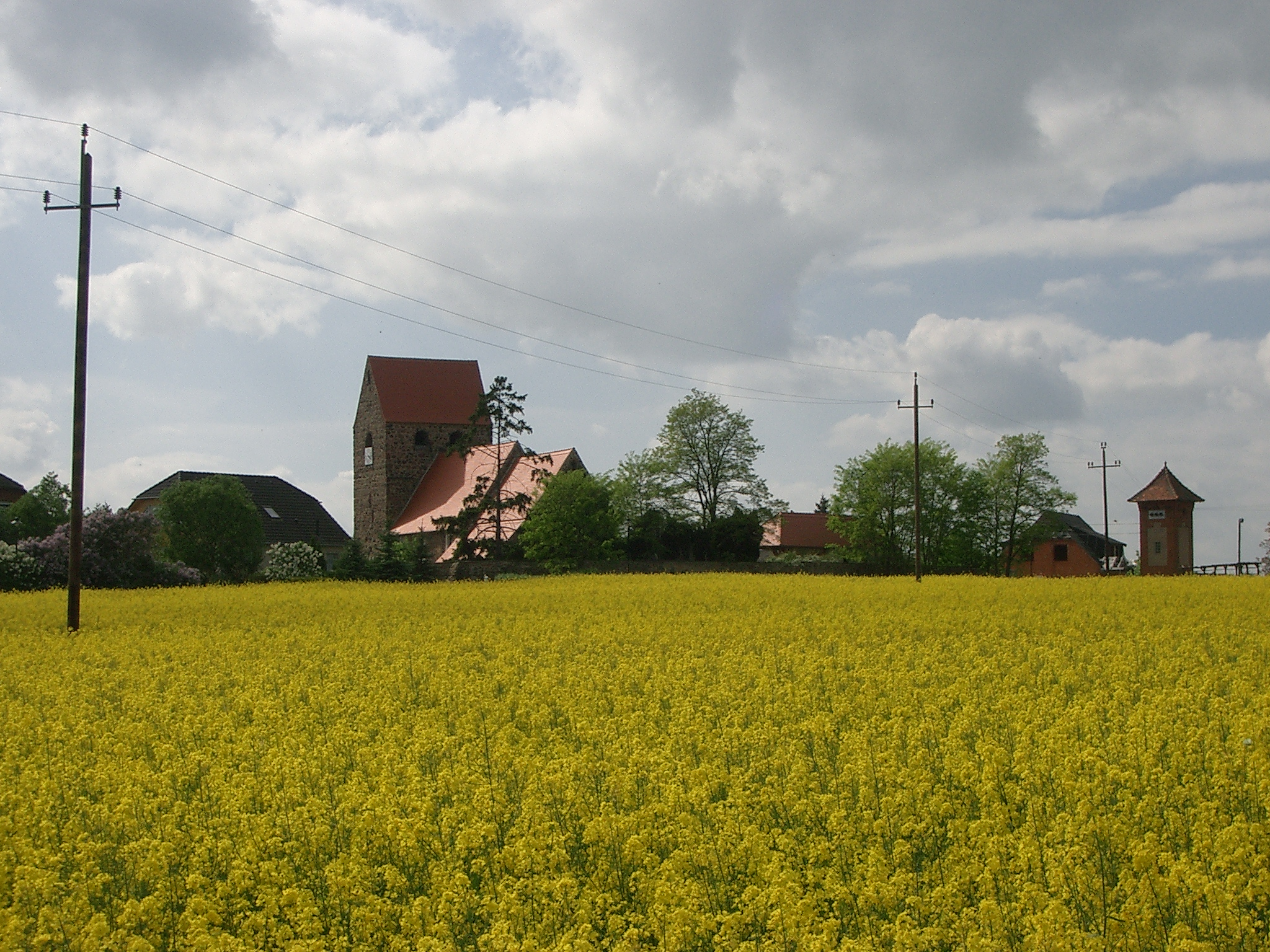 Schernikau